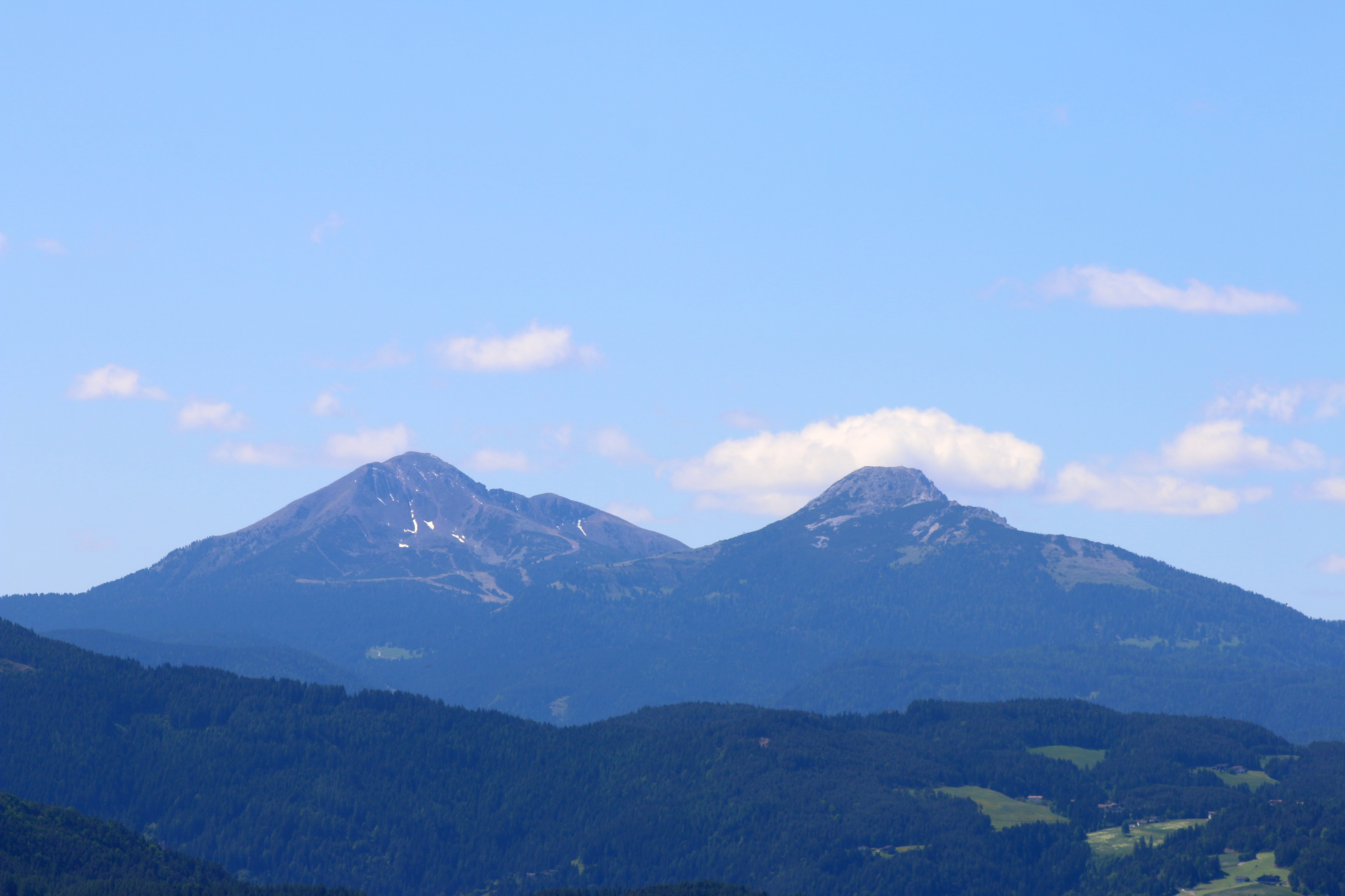 Barbian, Südtirol: Blick zum Schwarzhorn und Weißhorn